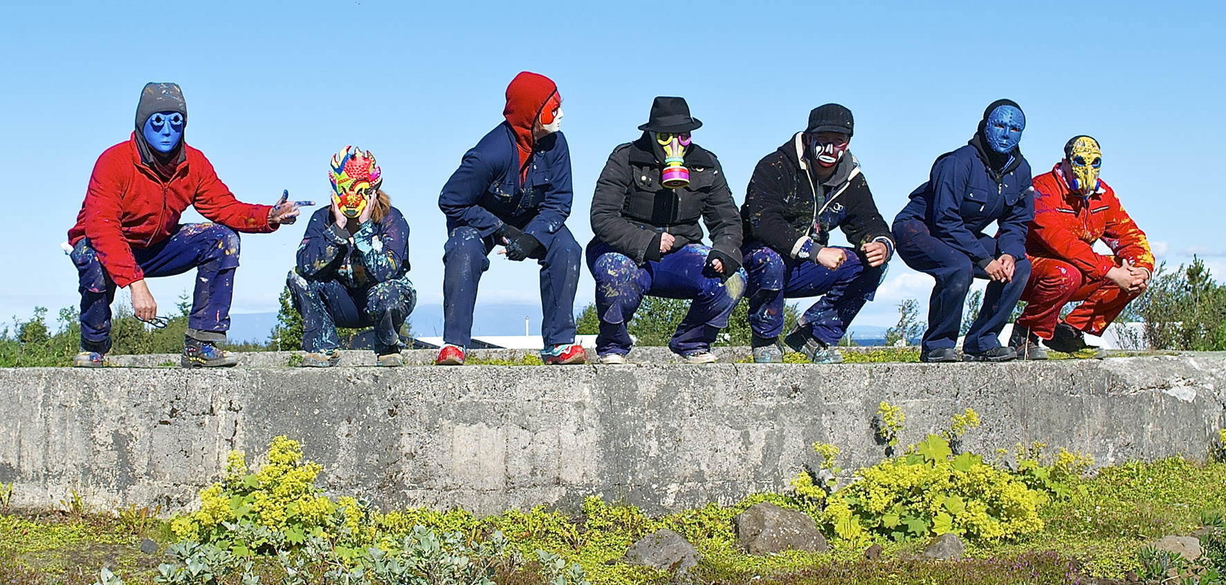 Toyisten in IJsland